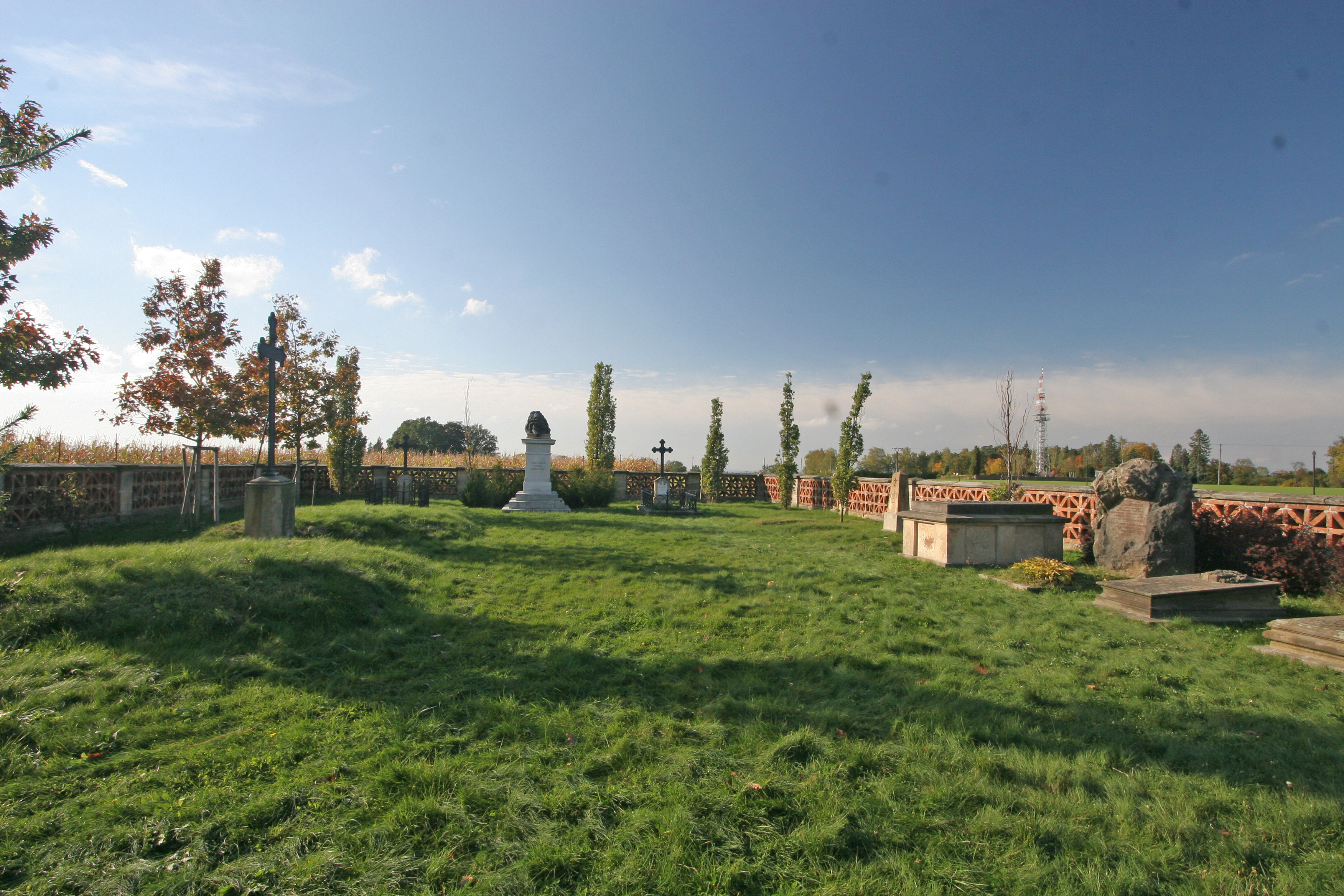 Vojenský hřbitov pruský a soubor pomníků v okolí obce (Chlum), v obci a v okolí, Chlum